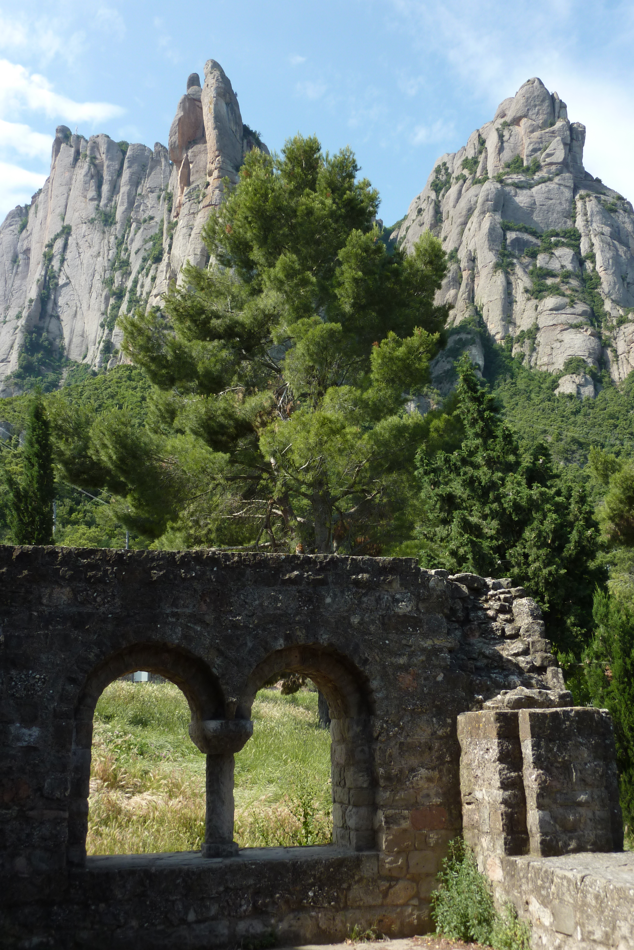 Kreuzgang der Kirche Santa Cecilia auf dem Montserrat (Berg), im Hintergrund die Berge des Montserrat